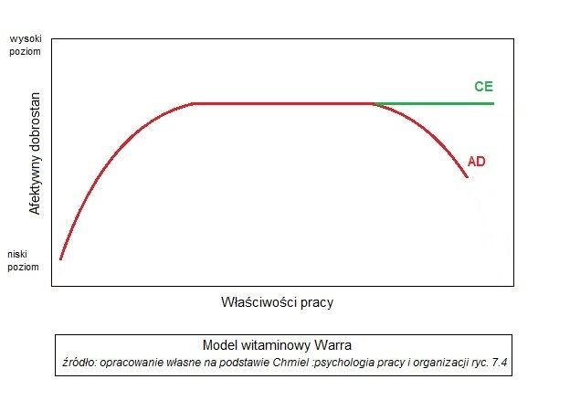 Wykres przedstawiający związek afektywnego dobrostanu pracownika w zależności od działania różnego rodzaju właściwości pracy